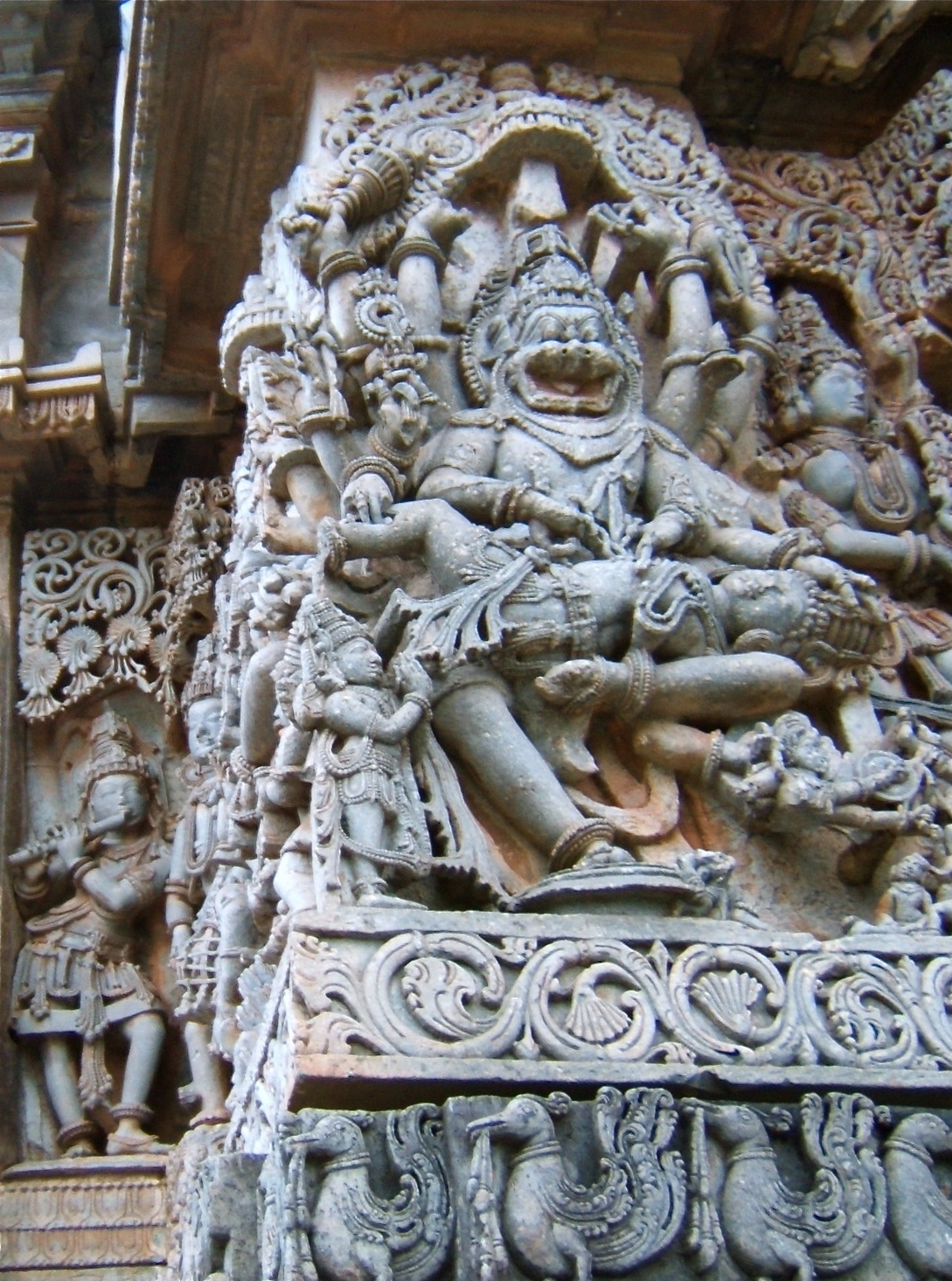 Narasimha_Avatar_Halebid Karnataka India